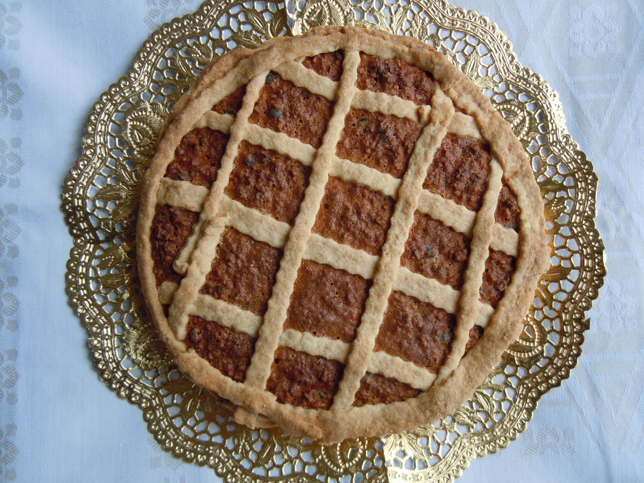 Torta di San Biagio, tipica di Cavriana (MN).